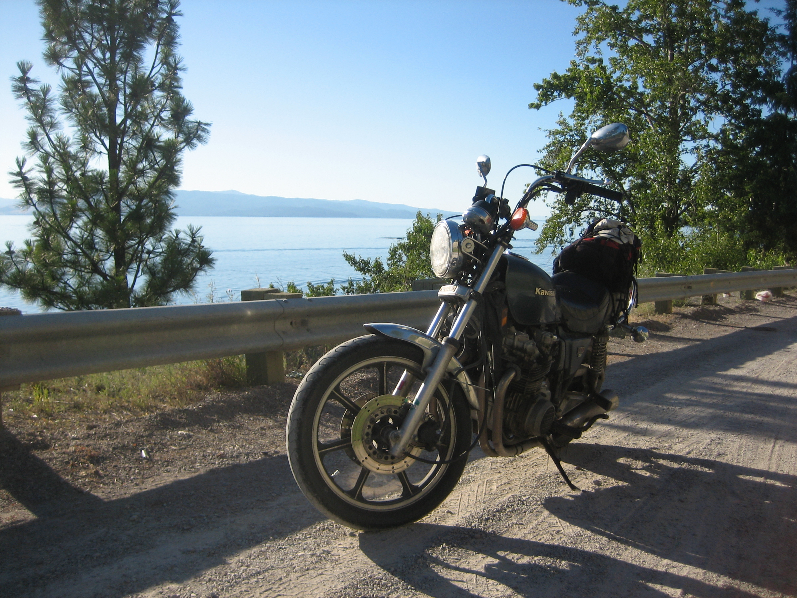 Kawasaki Z750LTD